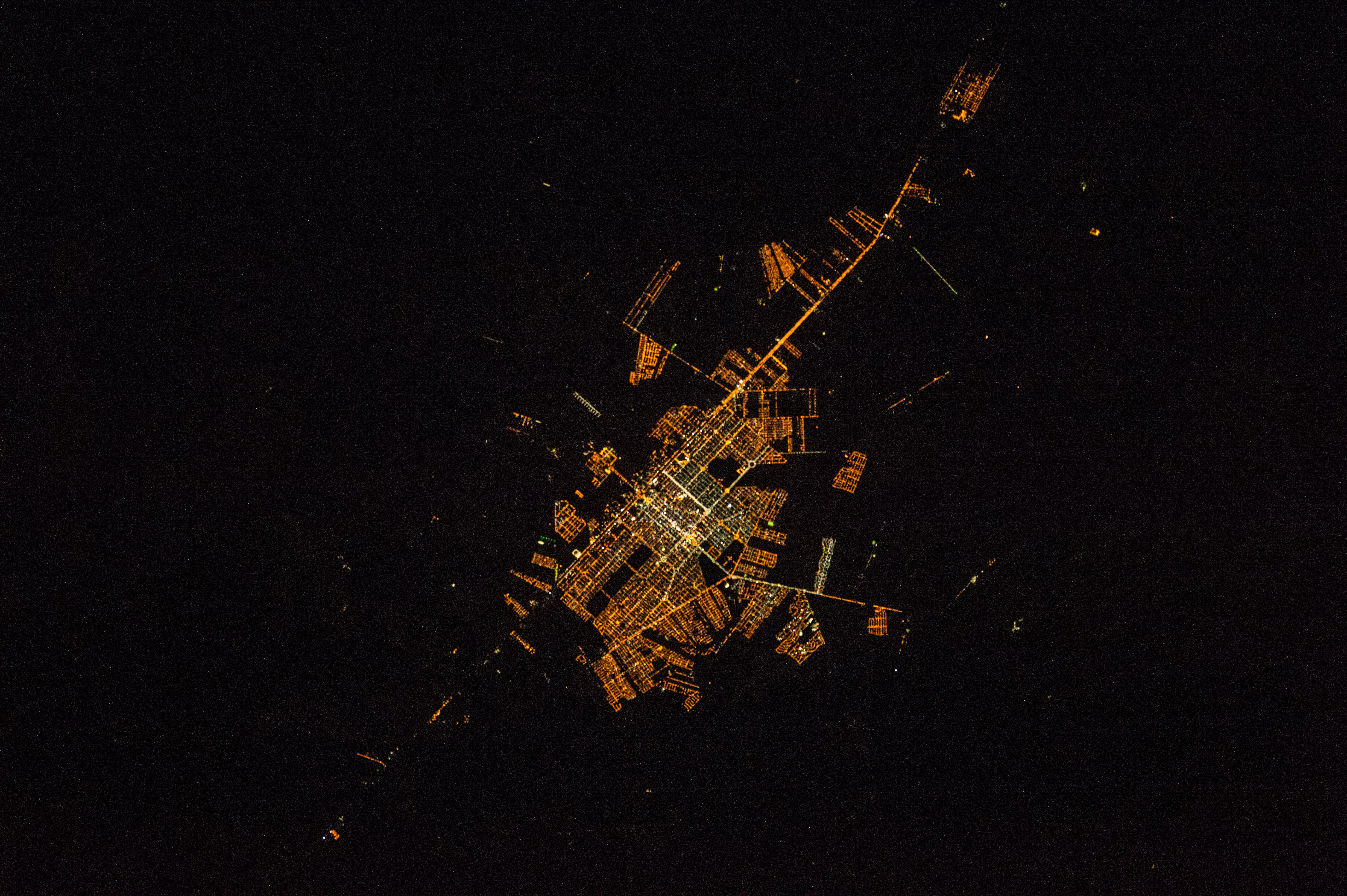 Imagem noturna da cidade de Sinop vista da ISS no ano de 2016.